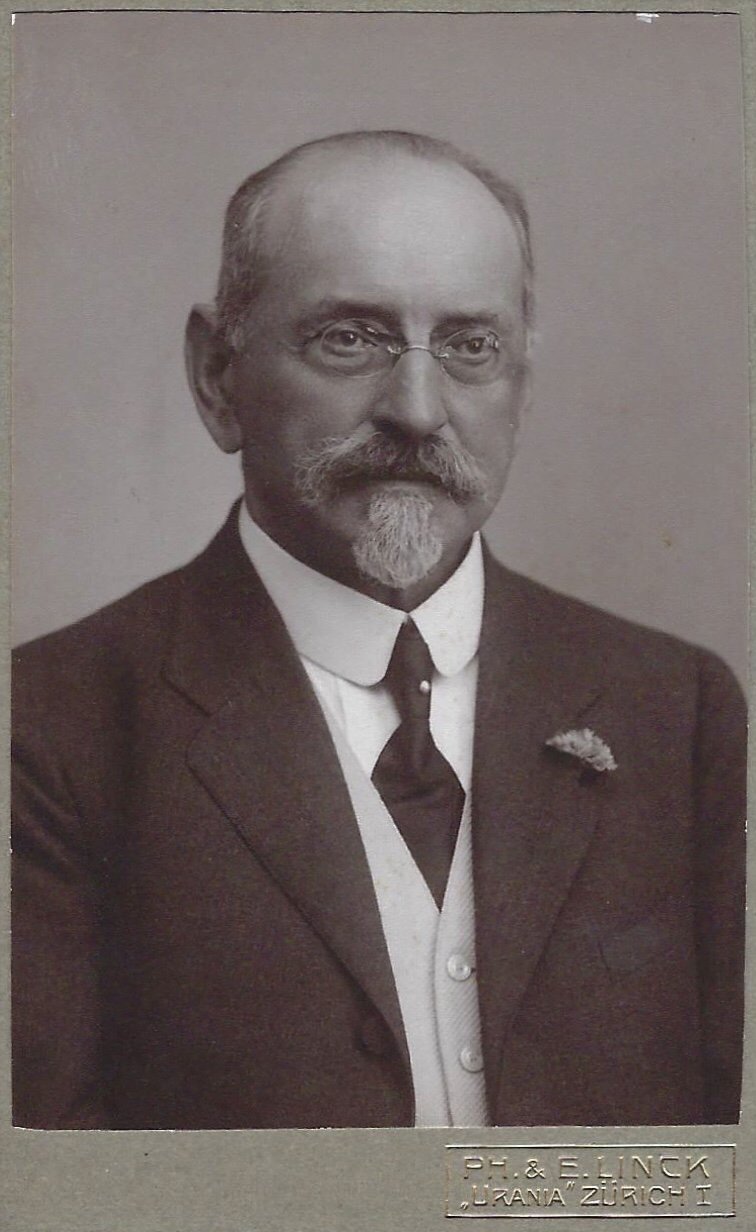 In Zürich und Mailand tätiger Schweizer Seidenkaufmann, Zürcher Kantonsrat und Gemeindepolitiker, Bankrat und Handelsrichter